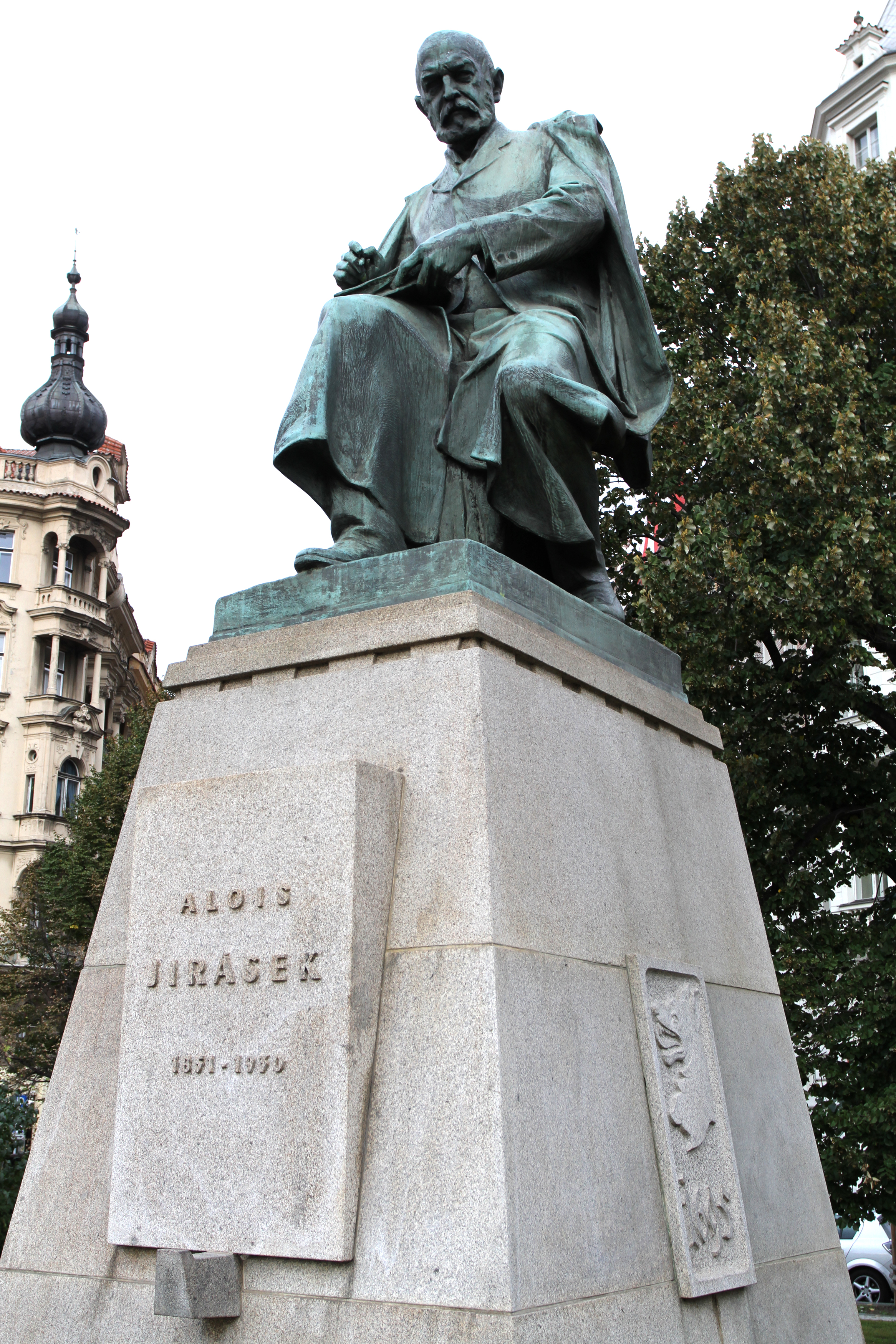 Pomník A. Jiráska (Nové Město), Praha 2, Jiráskovo náměstí, Nové Město